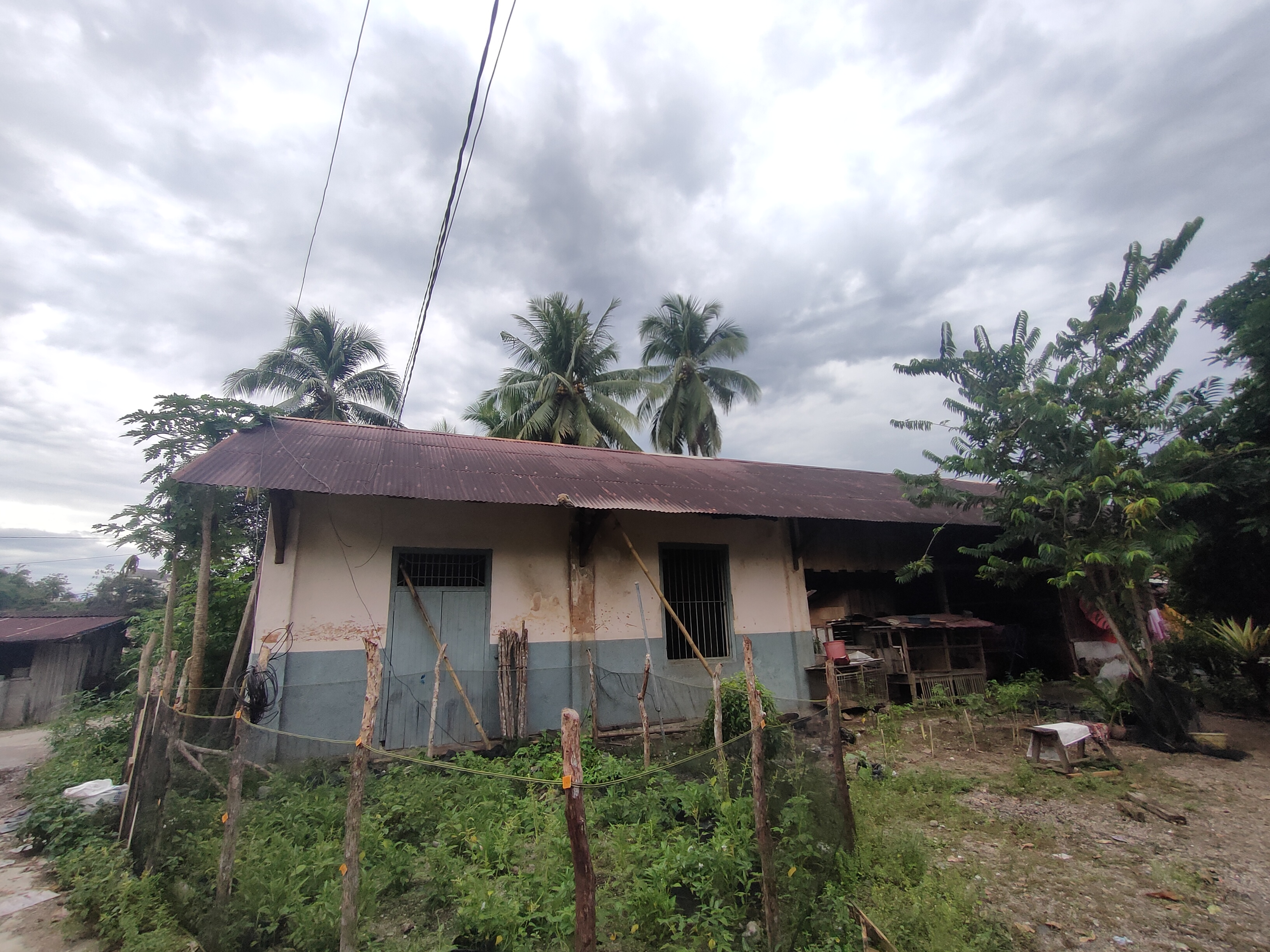 Stasiun Muaro atau biasa disebut Stasiun Logas pada tahun 2020 di Muaro Sijunjung, Kabupaten Sijunjung, Sumatera Barat